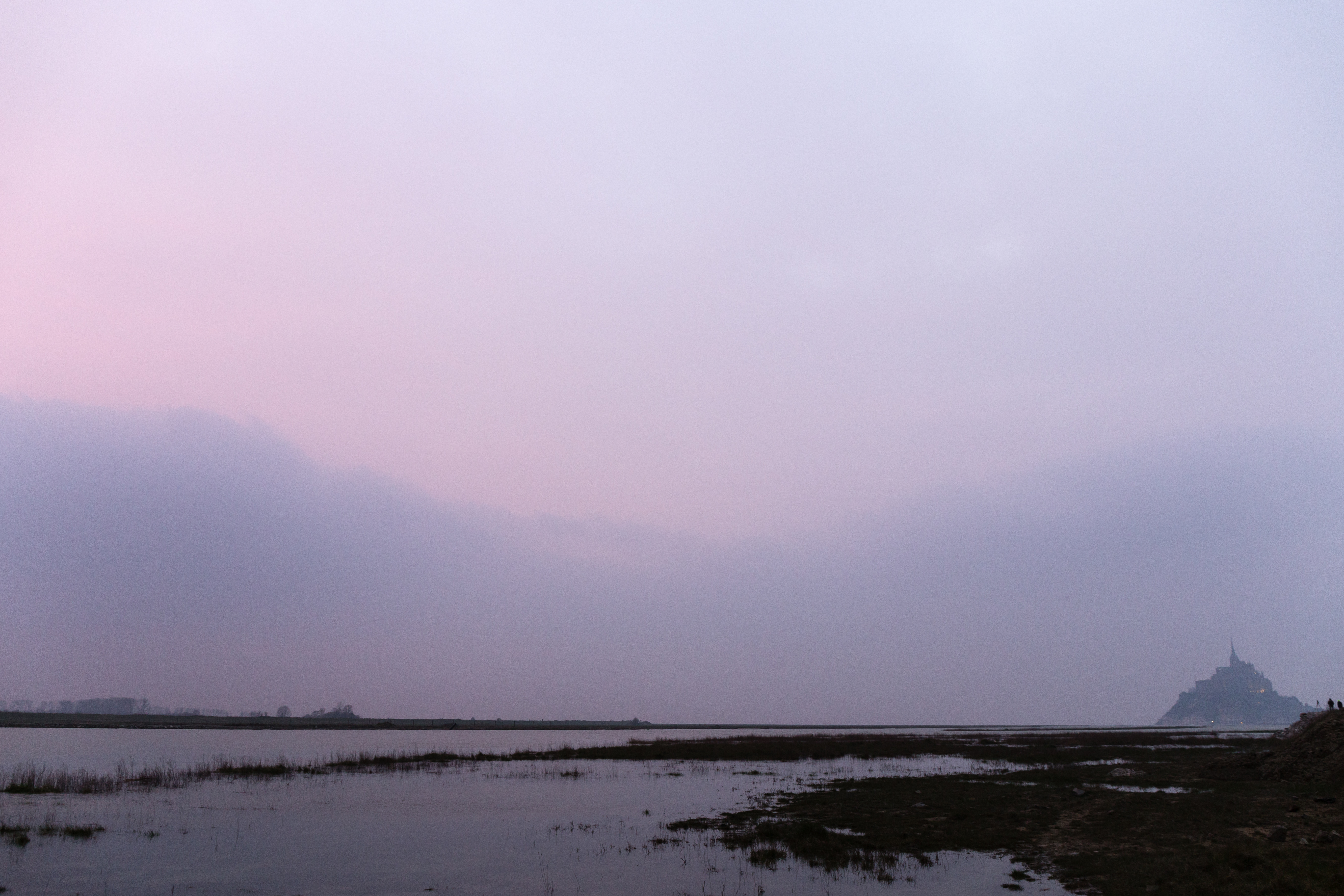 Le Mont Saint-Michel au moment de la marée haute de la « marée du siècle » de l'équinoxe de mars 2015.